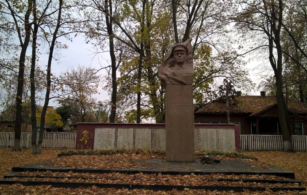 Гранітний пам'ятник-бюст Герою Радянського Союзу Івану Федотовичу Бугайченку. Встановлений у селі Потіївка (Радомишльського району).